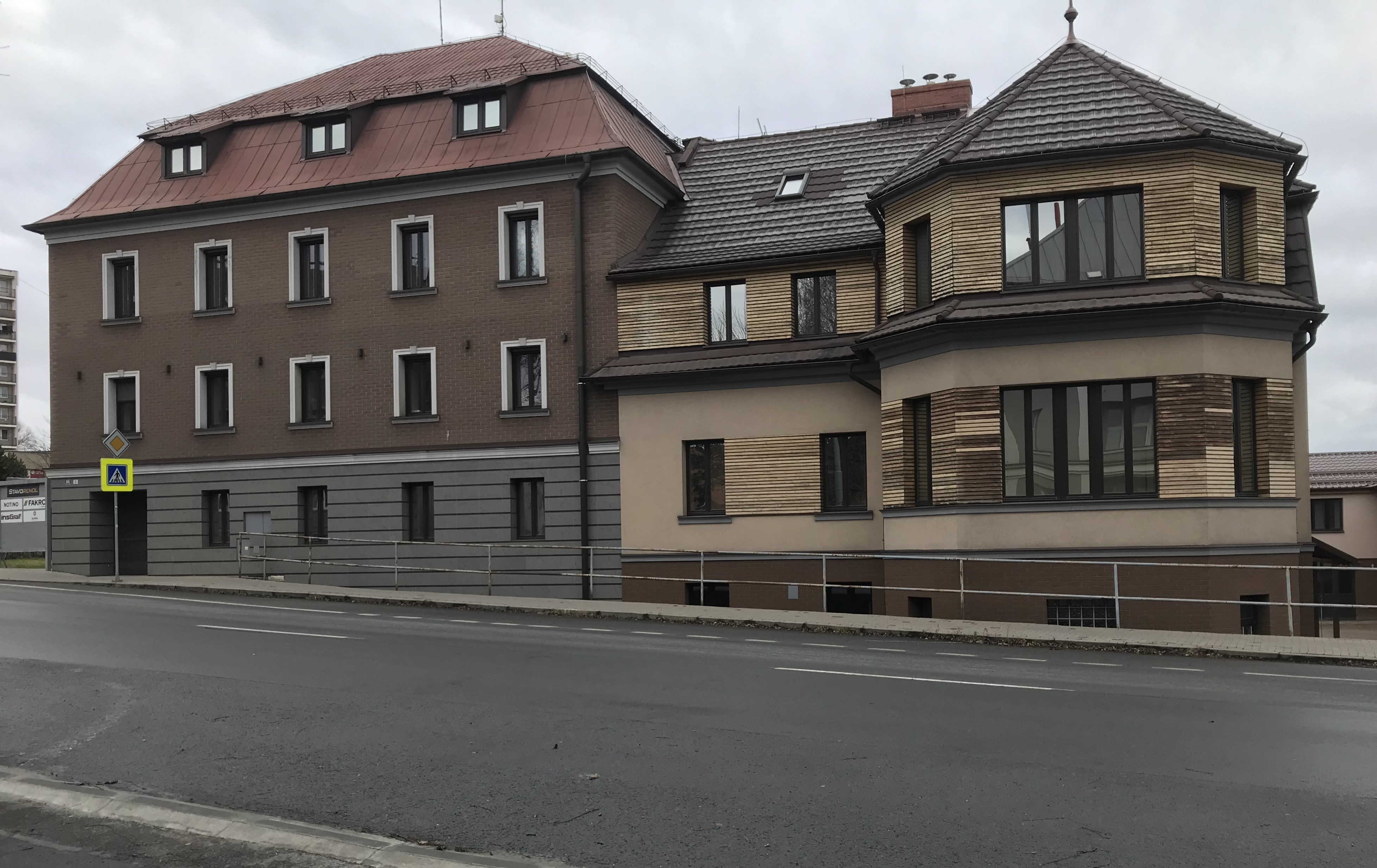 Starý vodní mlýn budova